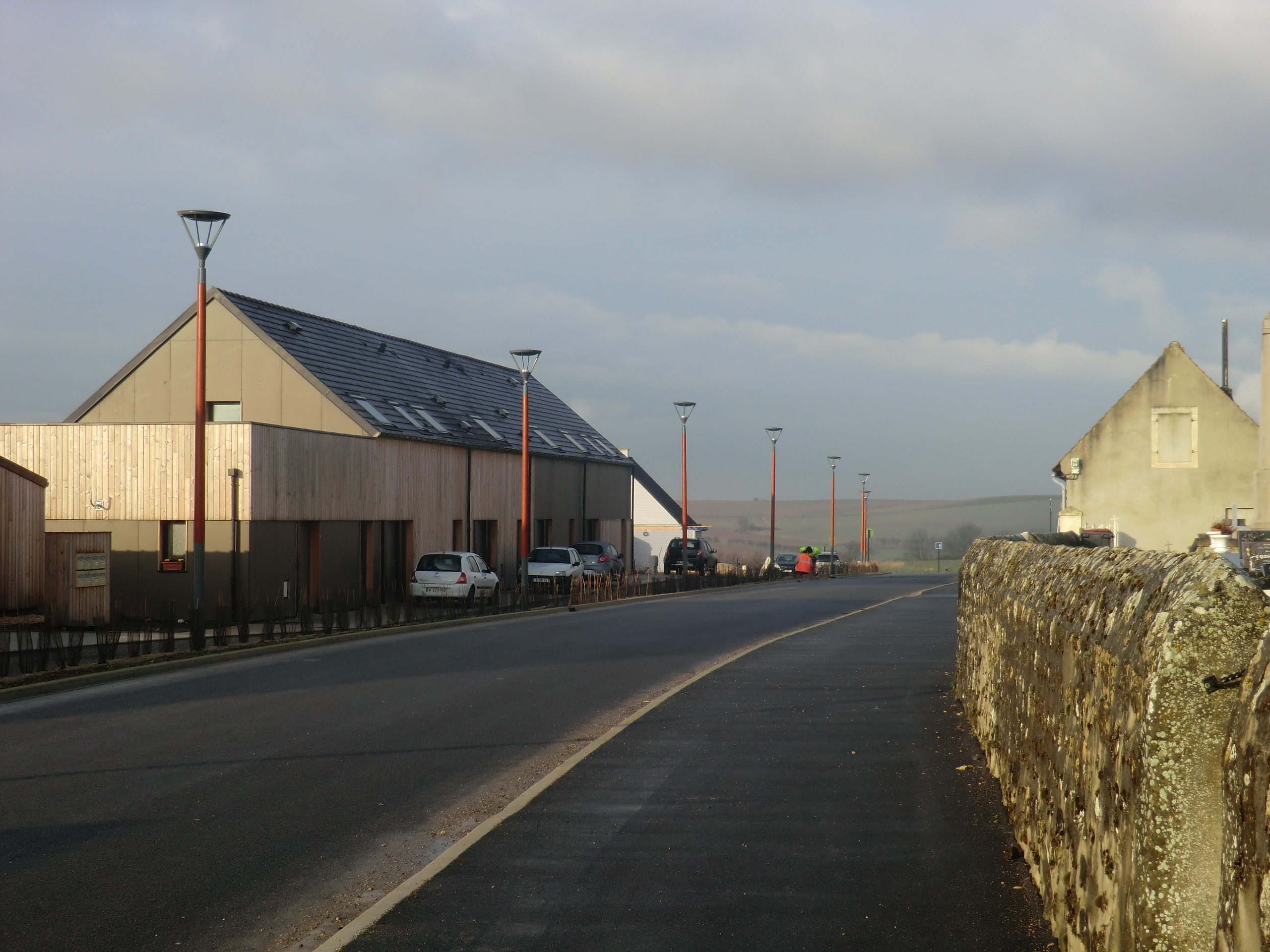 Extension urbaine à haute qualité environnementale de Beuvrequen, commune du Pas-de-Calais, en France.